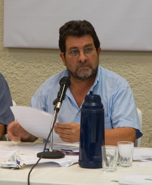 Eduardo Lalo Fernandez (Secretario General del Partido Socialista del Uruguay)